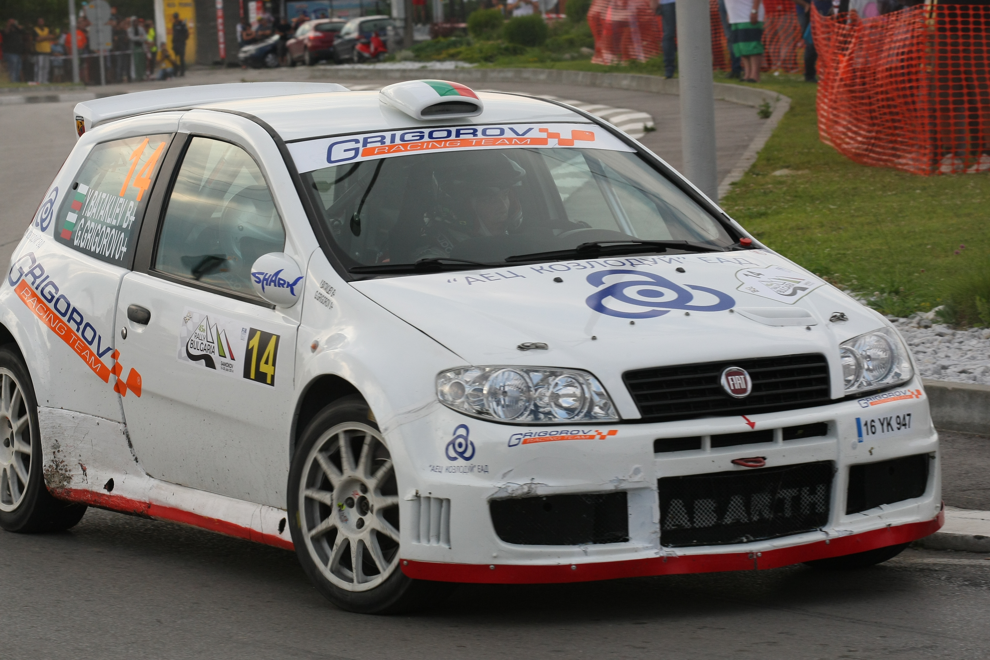 Григор Григоров - български автомобилен състезател, по време на Рали България 2014